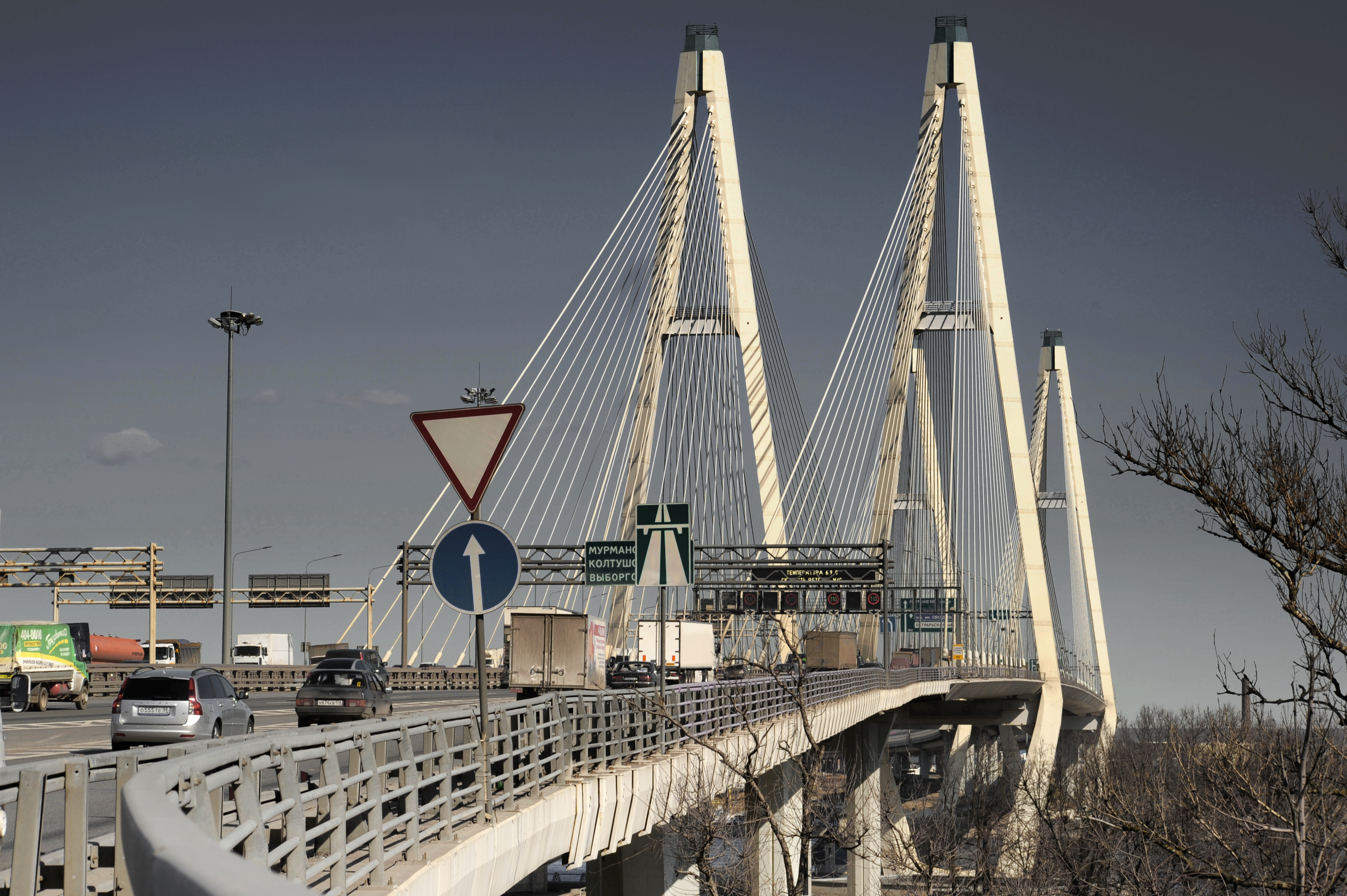 Пыль апреля на вантовом мосту